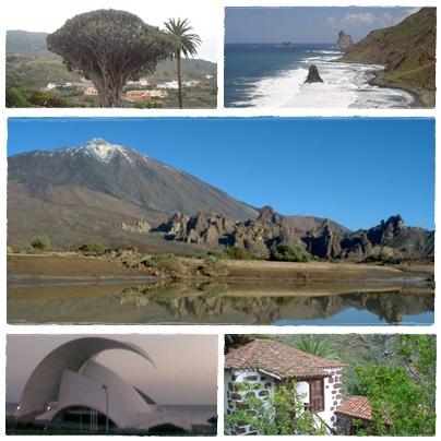 Drago Milenerio. Icod de los Vinos